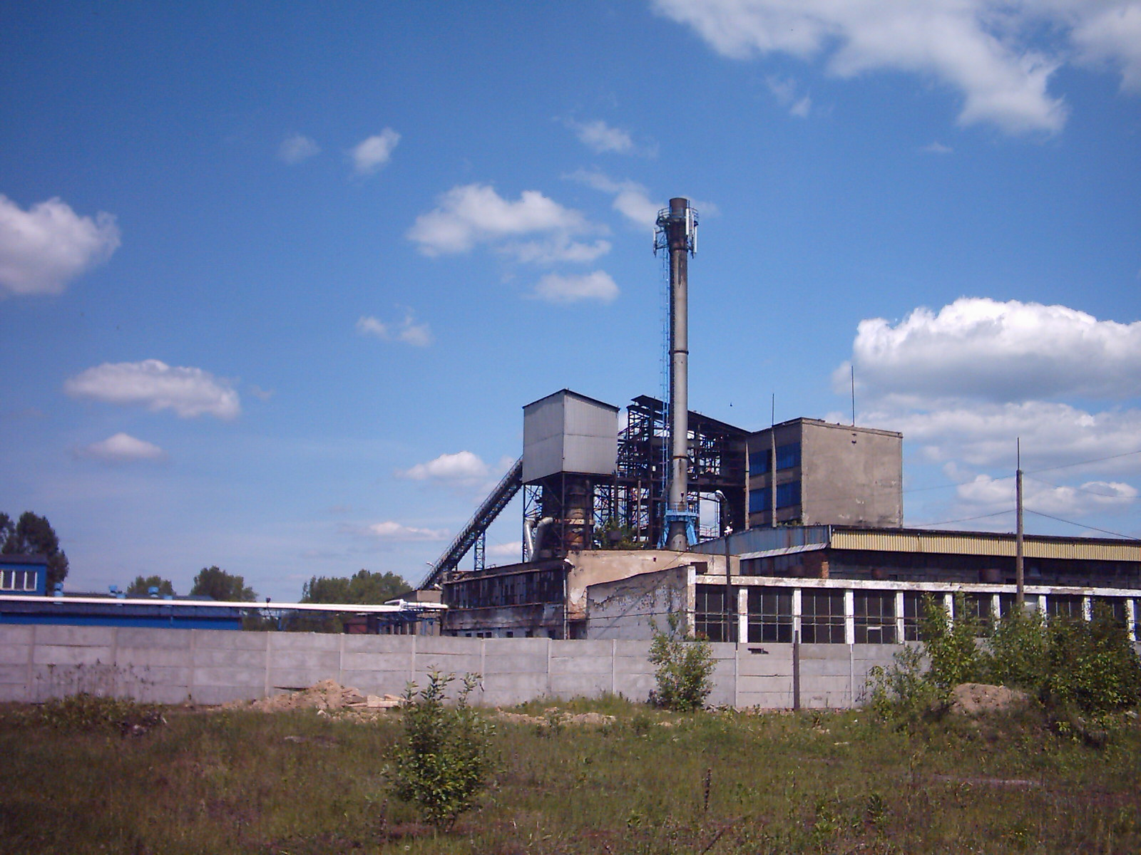 Fabryka Grywskand Hajnówka